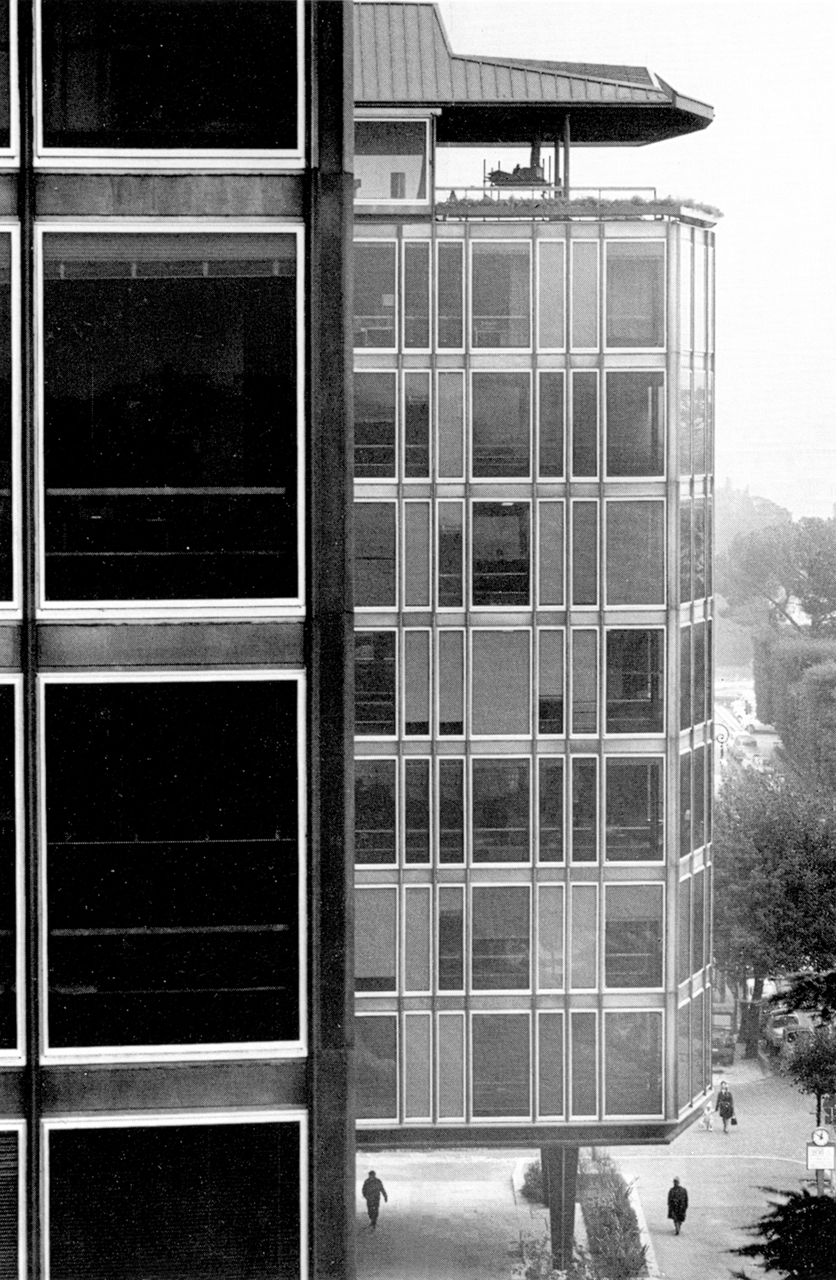 fer